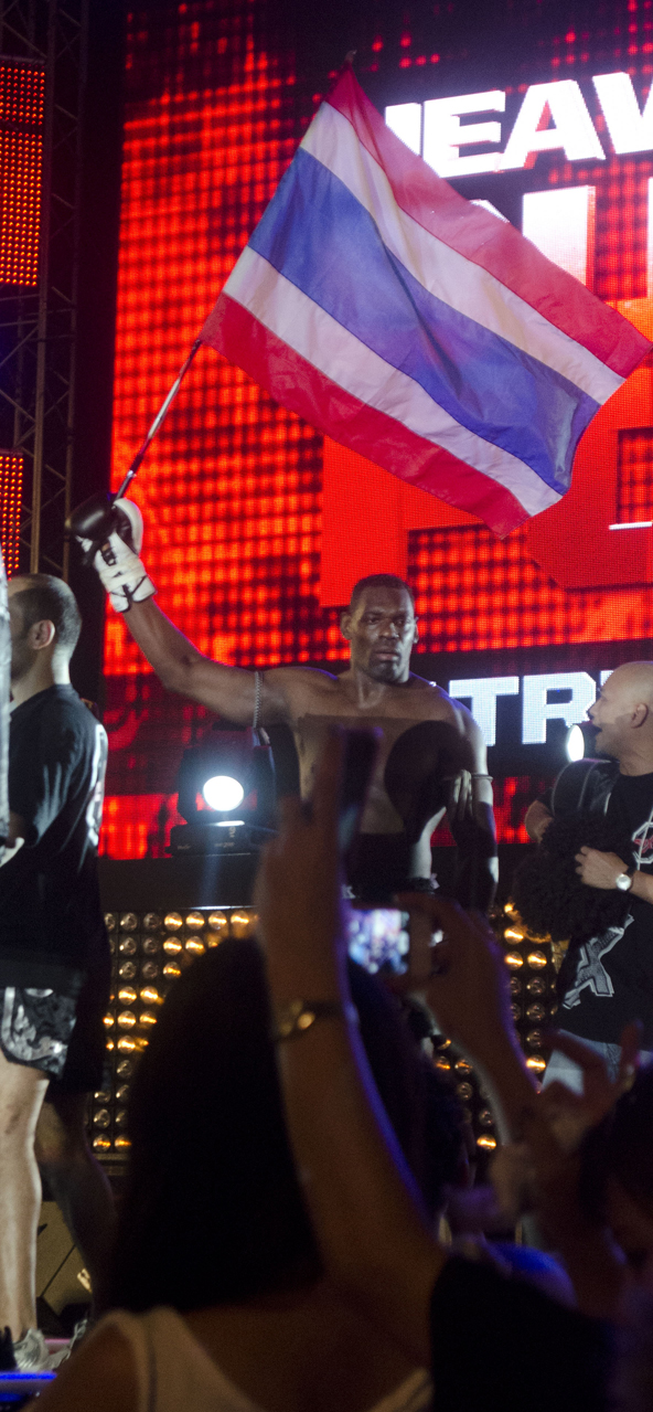 Patrice Quarteron